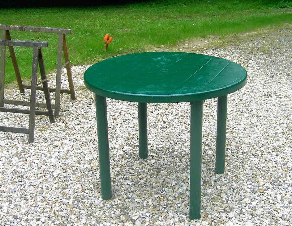 Table de jardin en plastique repeinte en vert.